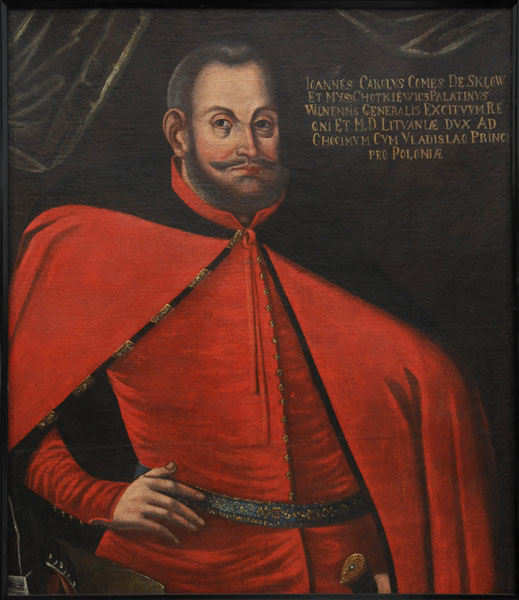 Беларуская (тарашкевіца): Партрэт Яна Караля Хадкевіча (Jan Karal Chadkievič)